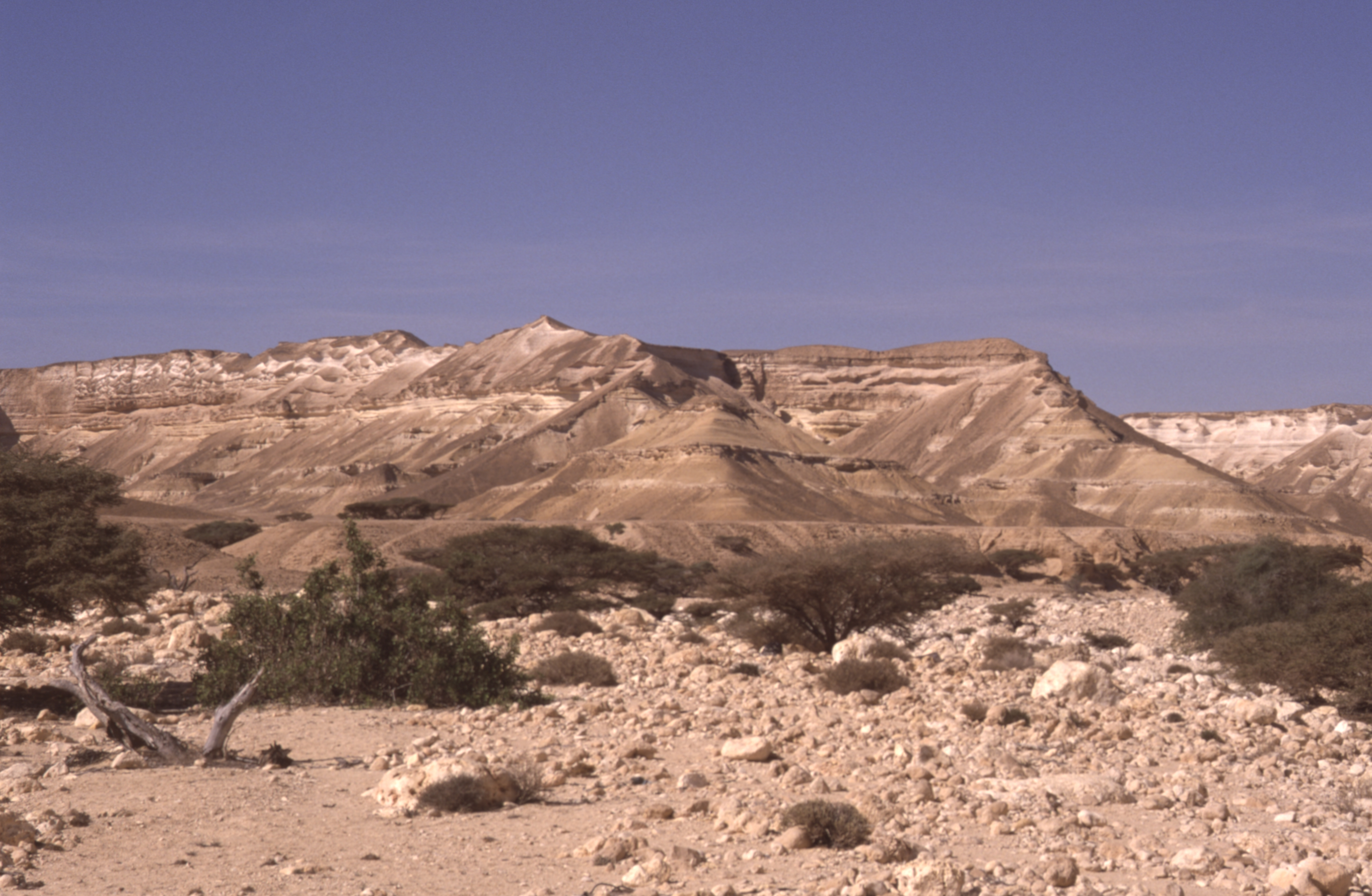 Wadi Shuwaymiyah im Oman, Februar 2001.